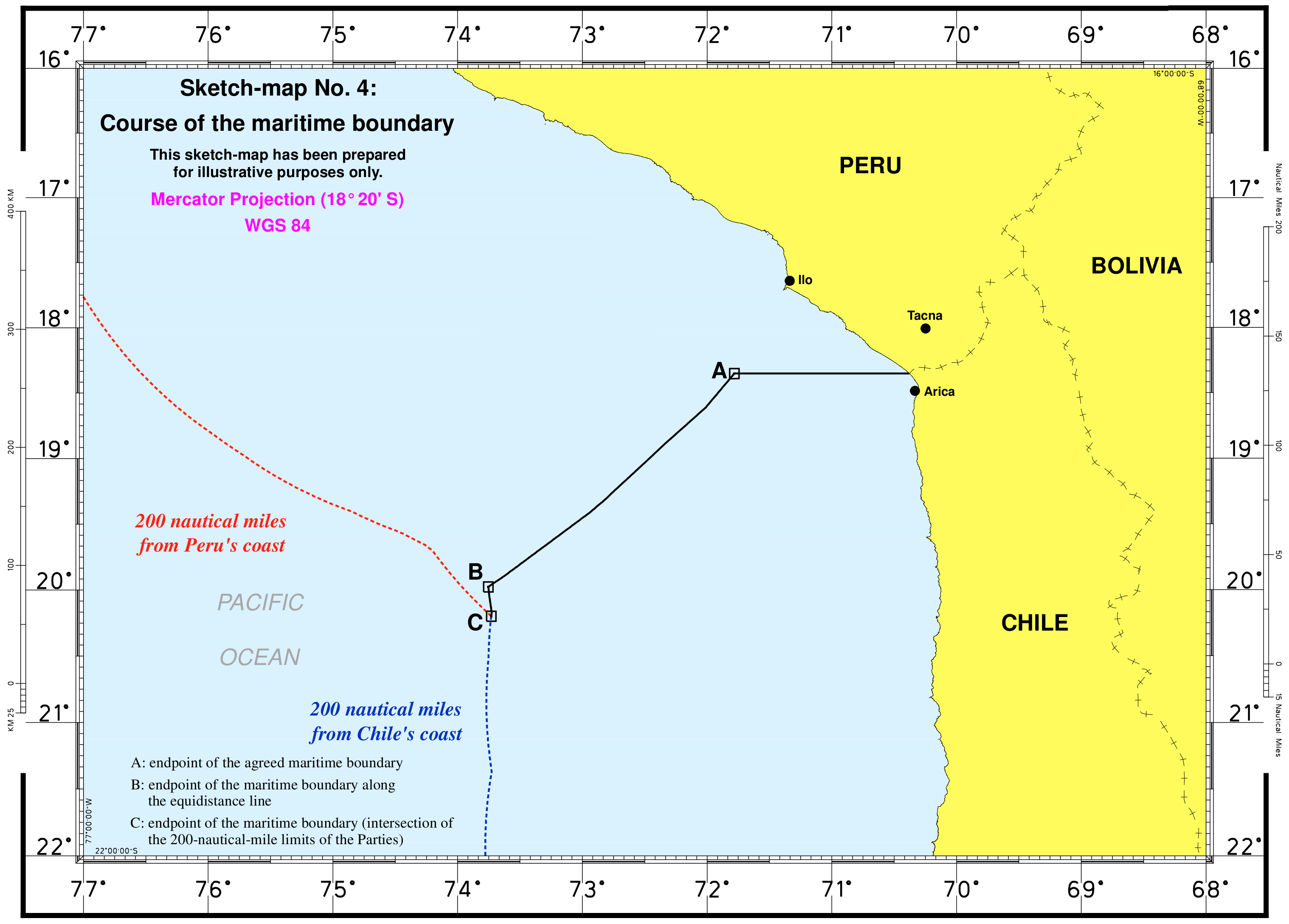 Mapa esquemático número 3 de la sentencia del 27 de enero de 2014 de la Corte Internacional de Justicia sobre la disputa de la frontera marítima entre Perú y Chile.